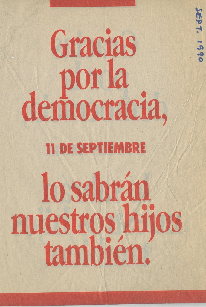 Los partidarios de Augusto Pinochet conmemoran un año más del aniversario del Golpe de Estado y su asunción al poder. El 14 de diciembre de 1989 Patricio Aylwin asumió como nuevo presidente de la República elegido democráticamente y el 11 de marzo de 1990 se reabrió el Congreso Nacional luego de realizarse elecciones parlamentarias. Pinochet por su parte, amparado en las disposiciones transitorias de la Constitución de 1980, se mantuvo por ocho años más en el puesto de comandante en jefe del Ejército.